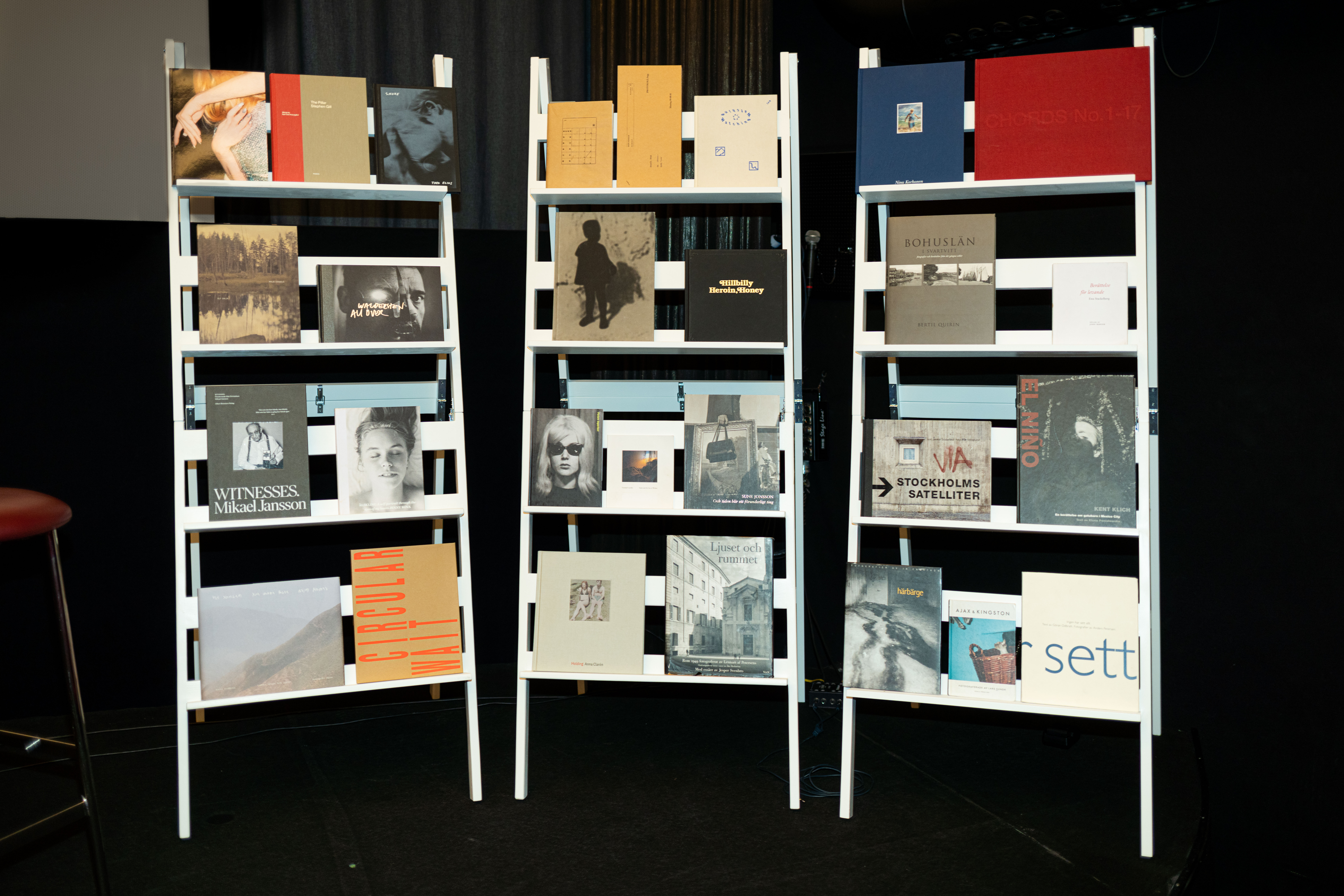 Svenska Fotobokspriset, Bio Rio, 11 mars 2020. Alla tidigare vinnare samt alla nominerade böcker 2020. Arrangerat av Fotoförfattarna, Svenska Fotografers Förbund